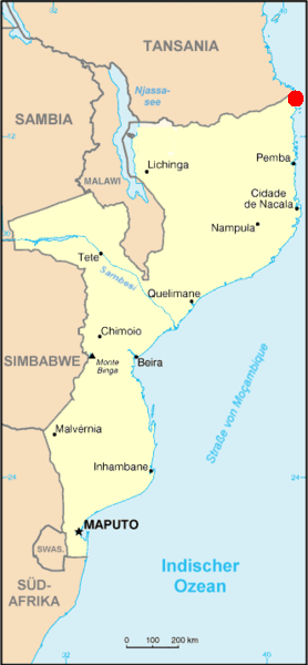 Karte von Kap Delgado in Mosambik